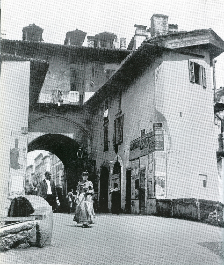 Milano, la pusterla dei Fabbri lato Naviglio